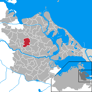 Züssow, Landkreis Ostvorpommern, Mecklenburg-Vorpommern